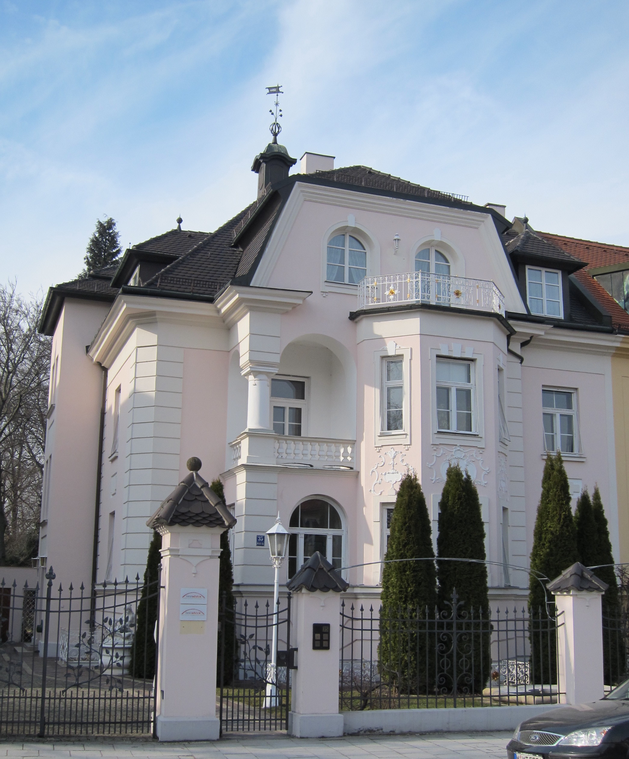 Möhlstr. 35; Villa, neubarock, 1894 von den Gebrüdern Adam und Johann Grässel und Max Krauss; bildet mit dem anstoßenden Nr. 37 eine Gruppe.